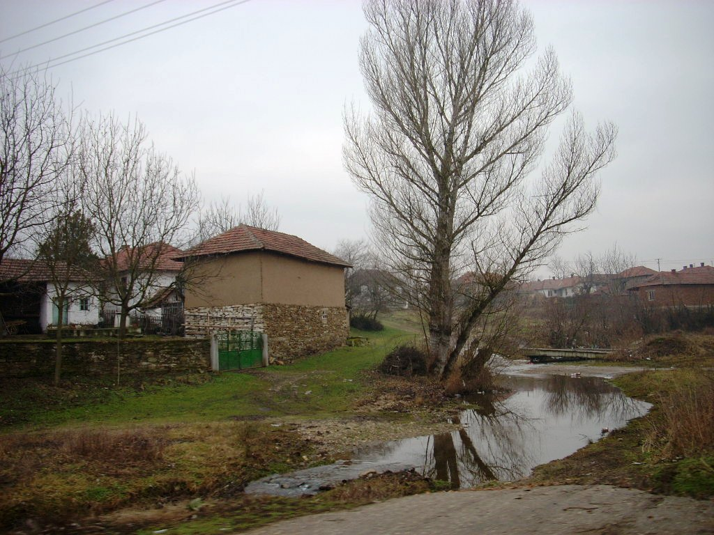 Gornje Konjuvce, Bojnik